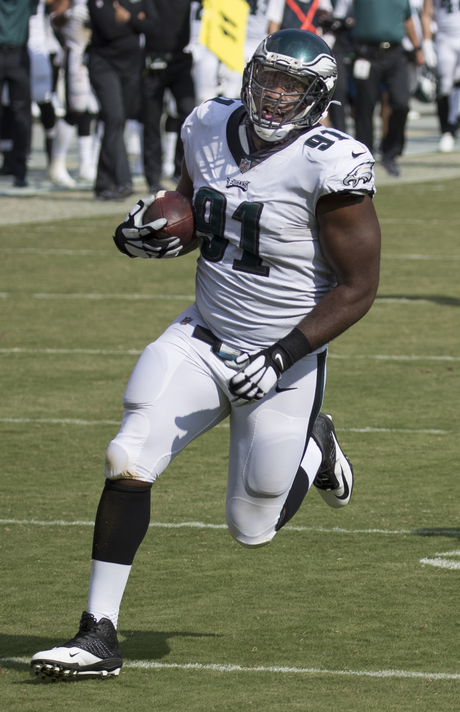 Eagles at Redskins 9/10/17